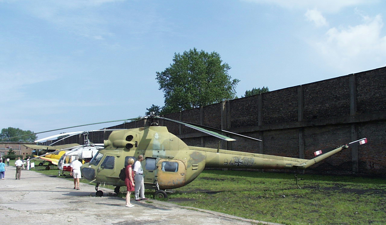 Ein Hubschrauber Mil Mi-2